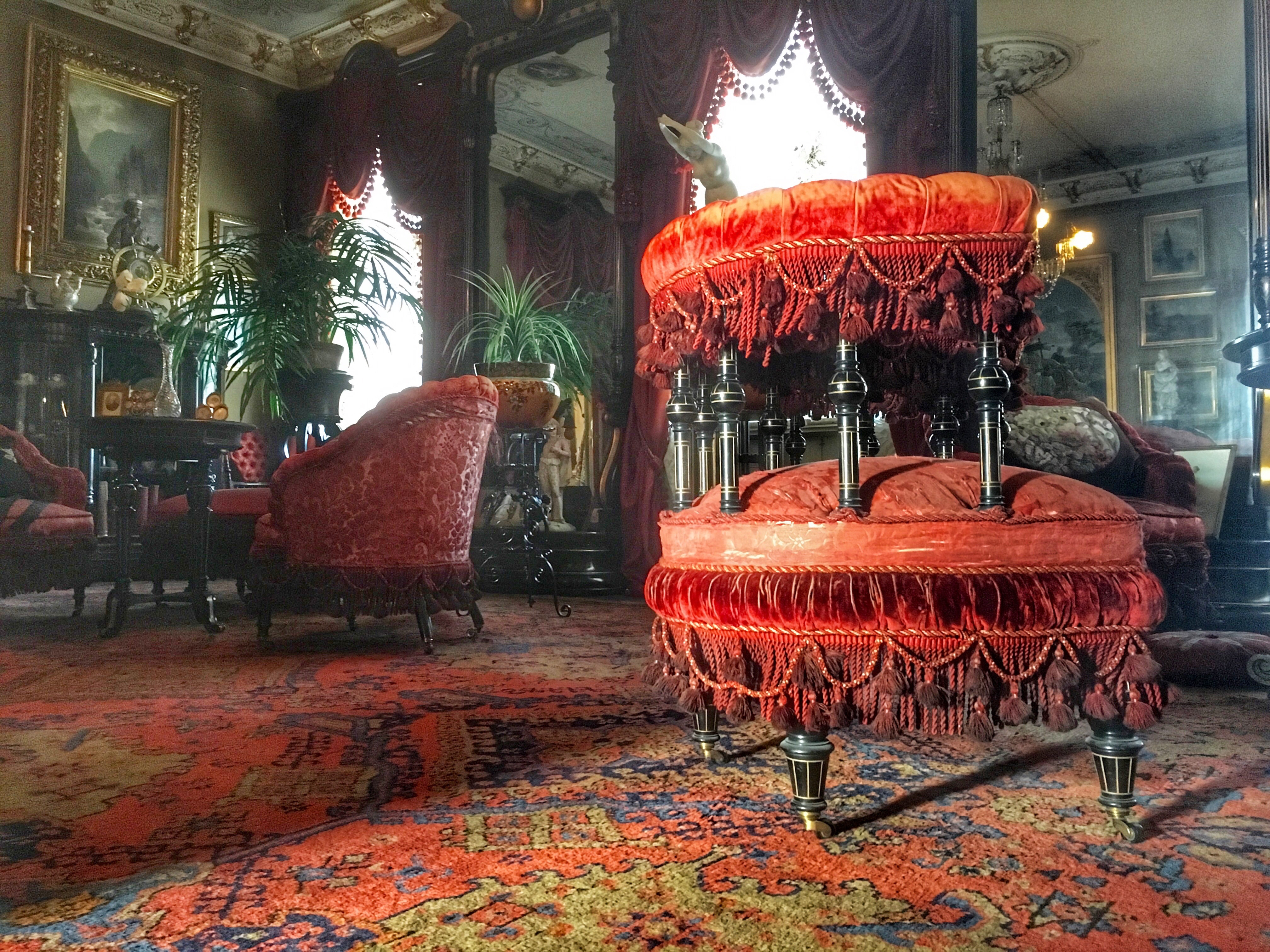 Interiør fra salon i Klunkehjemmet, København